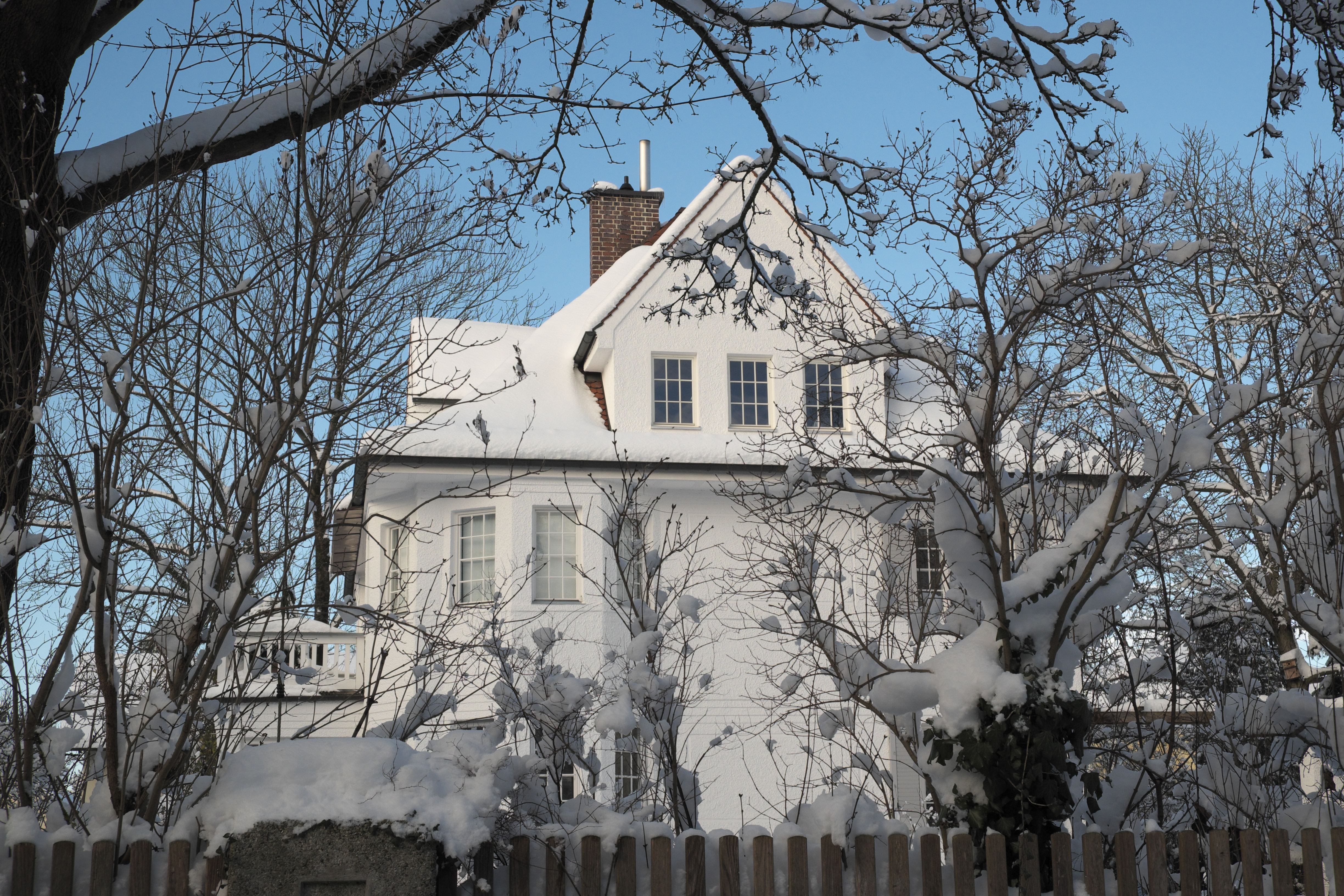 Villa in der Floßmannstraße 3 in Pasing im Stadtbezirk Pasing-Obermenzing in München (Bayern/Deutschland), 1910 von Walter Sartorius erbaut